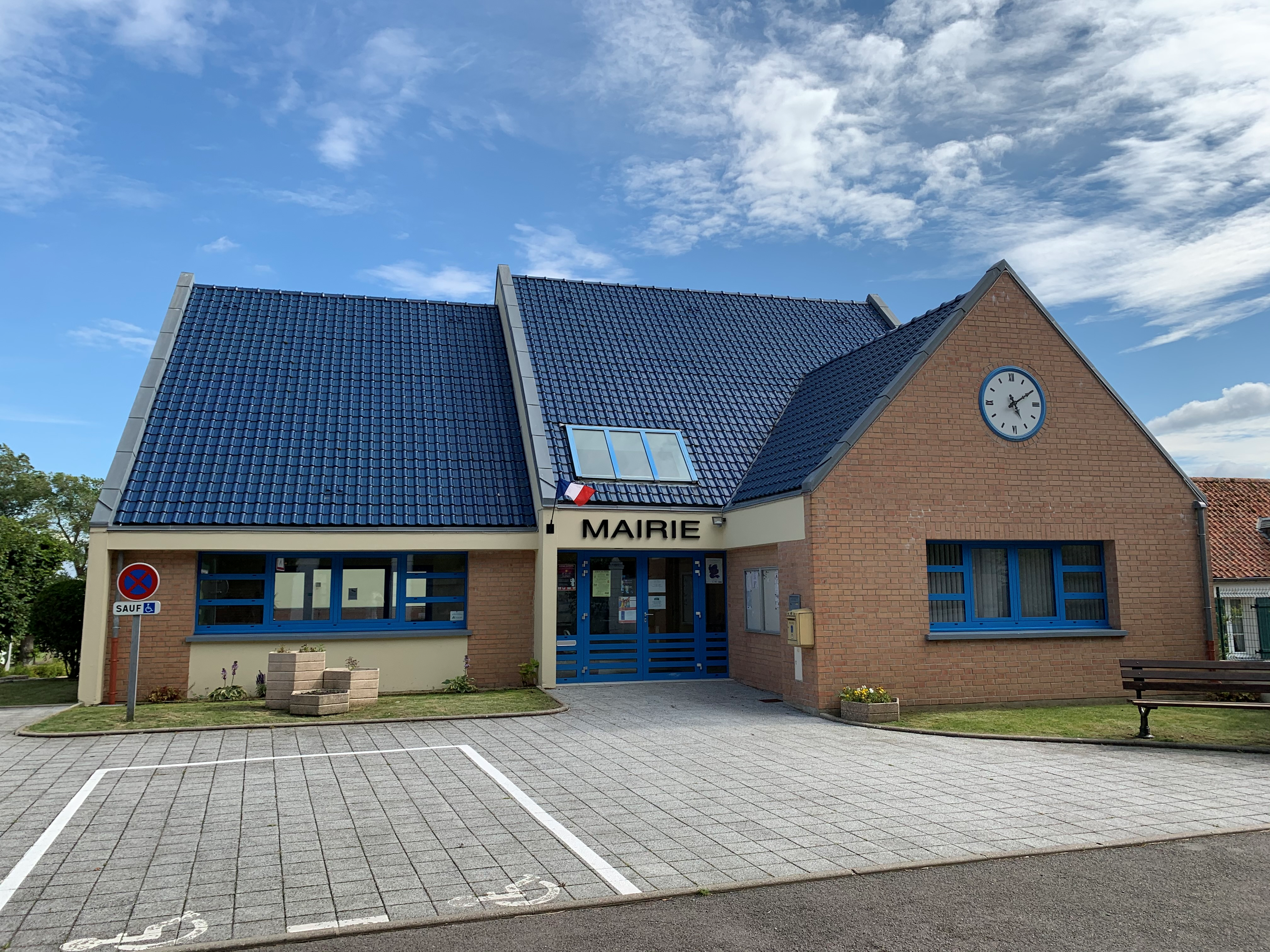 La Mairie de Saint-Tricat (62185).